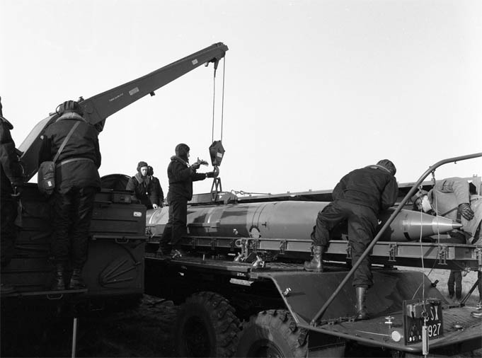 Pierwszy start Toczki w WP